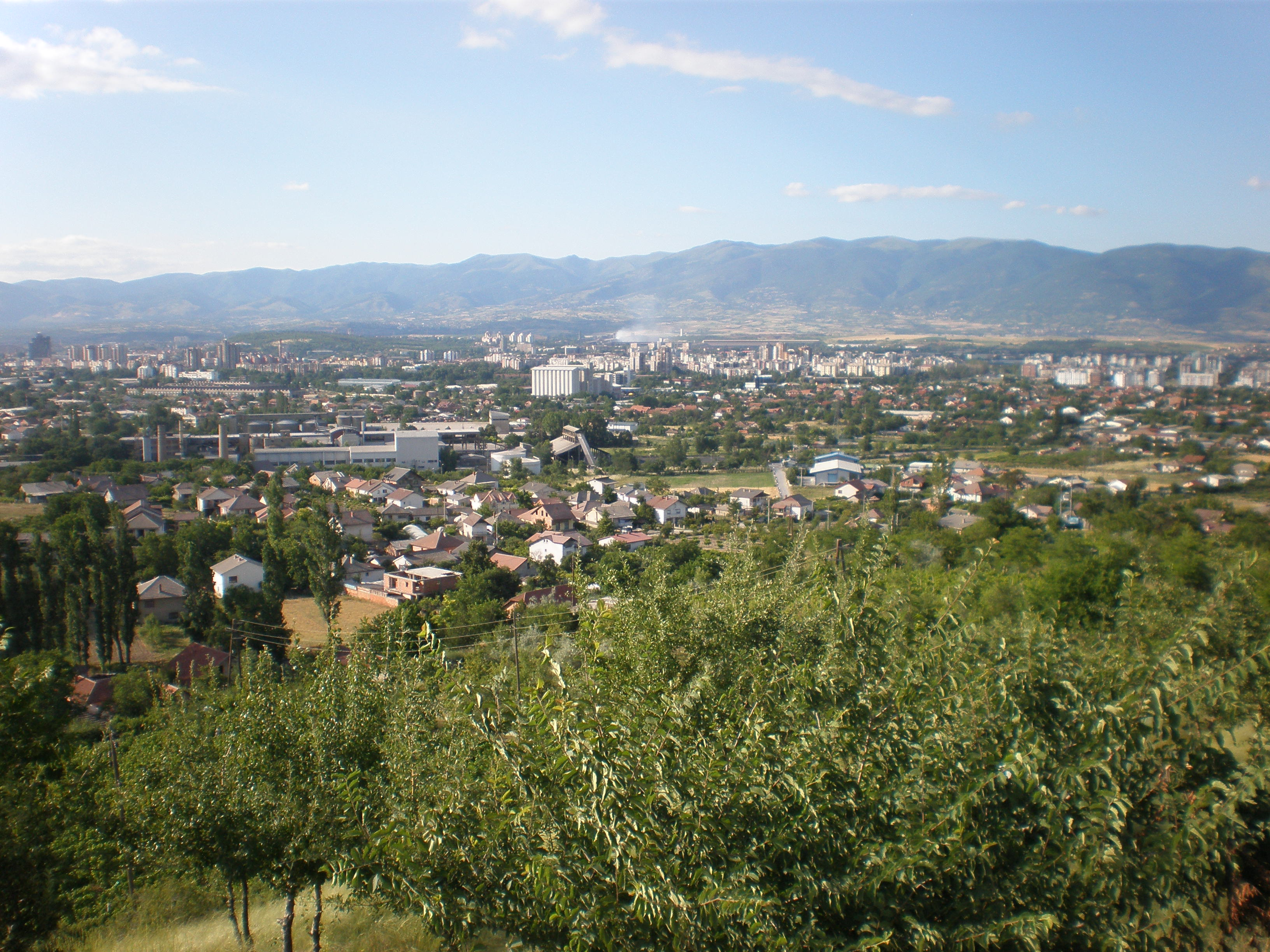 Поглед кон новиот дел на село Усје, цементарницата и градот Скопје